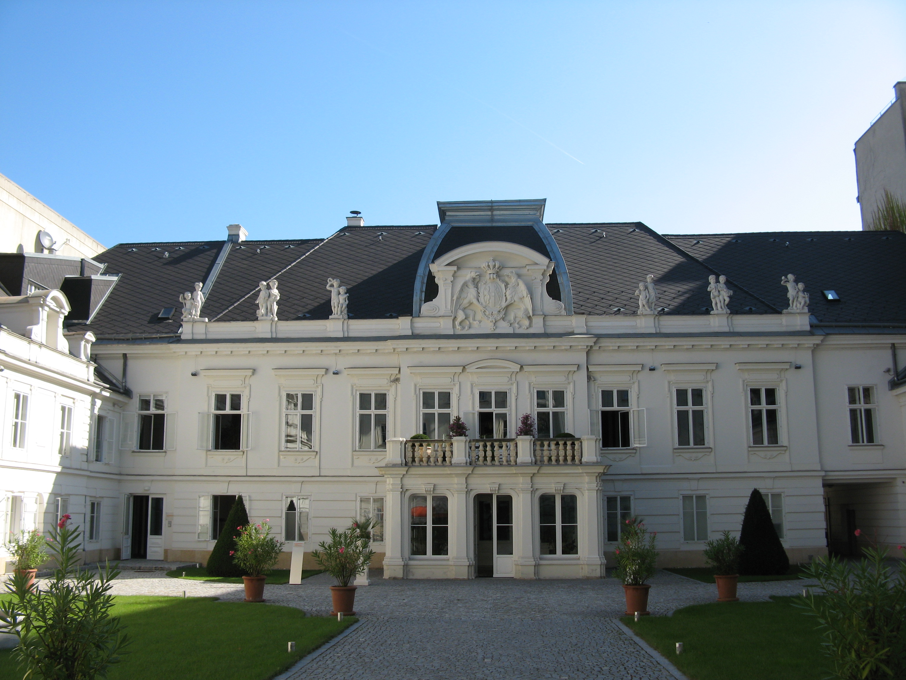 Palais Erzherzog Carl Ludwig (1872-73) von Heinrich Ferstel, Favoritenstraße 7, Wien-Wieden